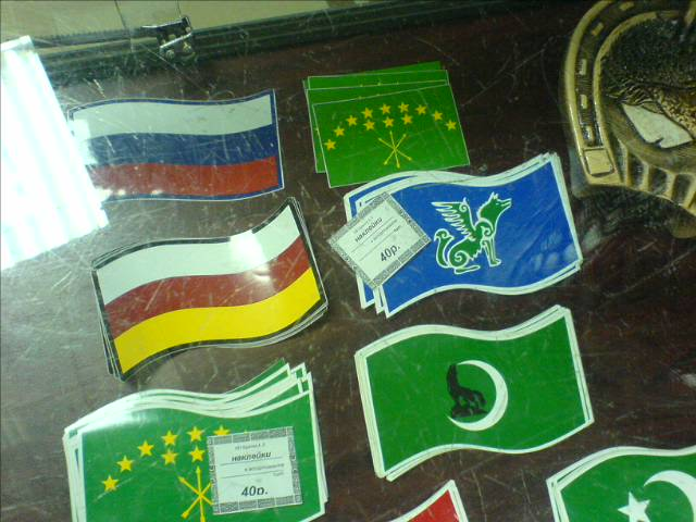 Черкесские сувениры